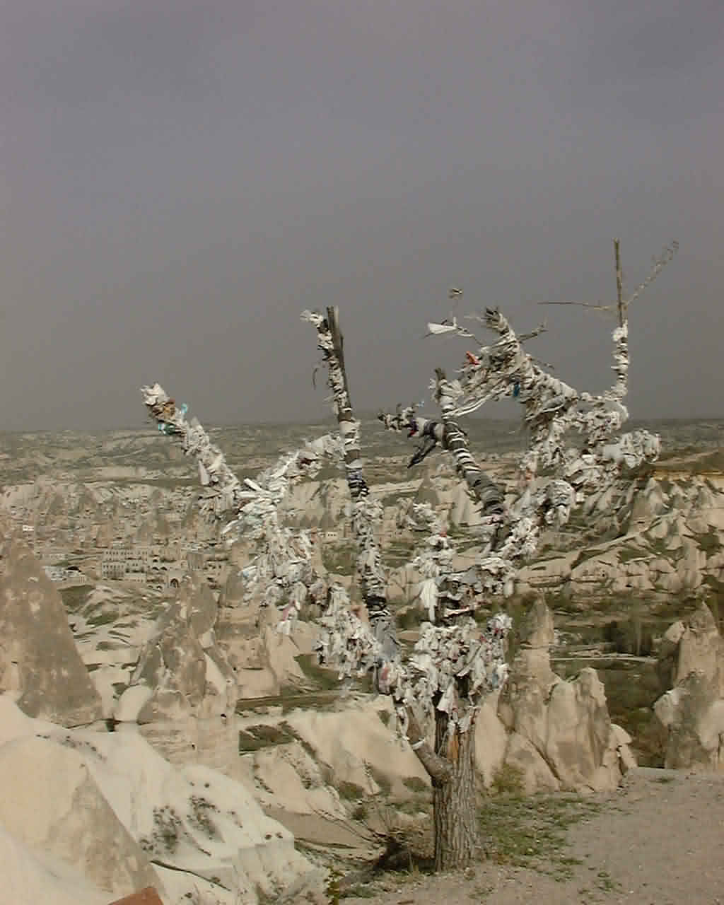 Arbre à prières - Cappadoce (Turquie)